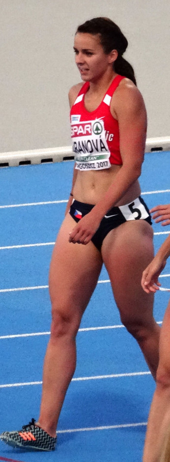 Młodzieżowe Mistrzostwa Europy w Lekkoatletyce U23 w Bydgoszczy 13-16 lipca 2017, półfinał biegu na 100 m przez płotki kobiet